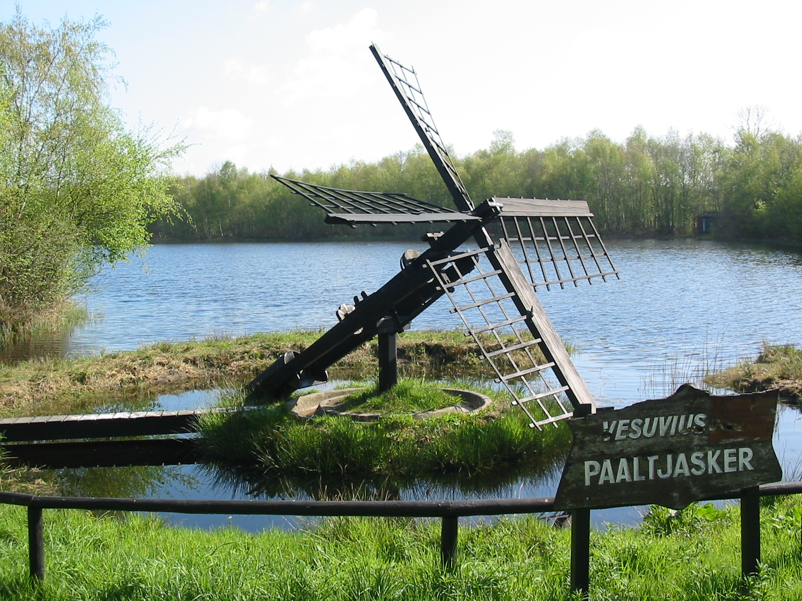 Elsloo Tjasker Vesuvius